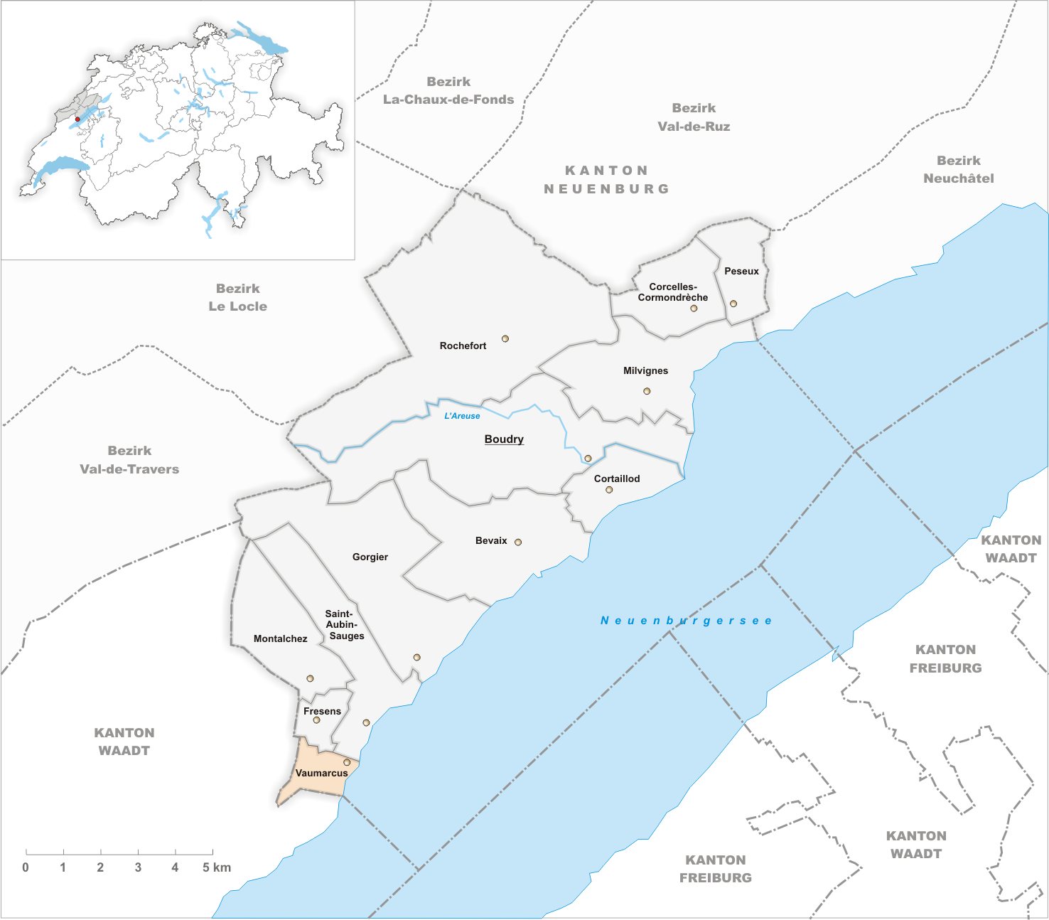 Municipality Vaumarcus